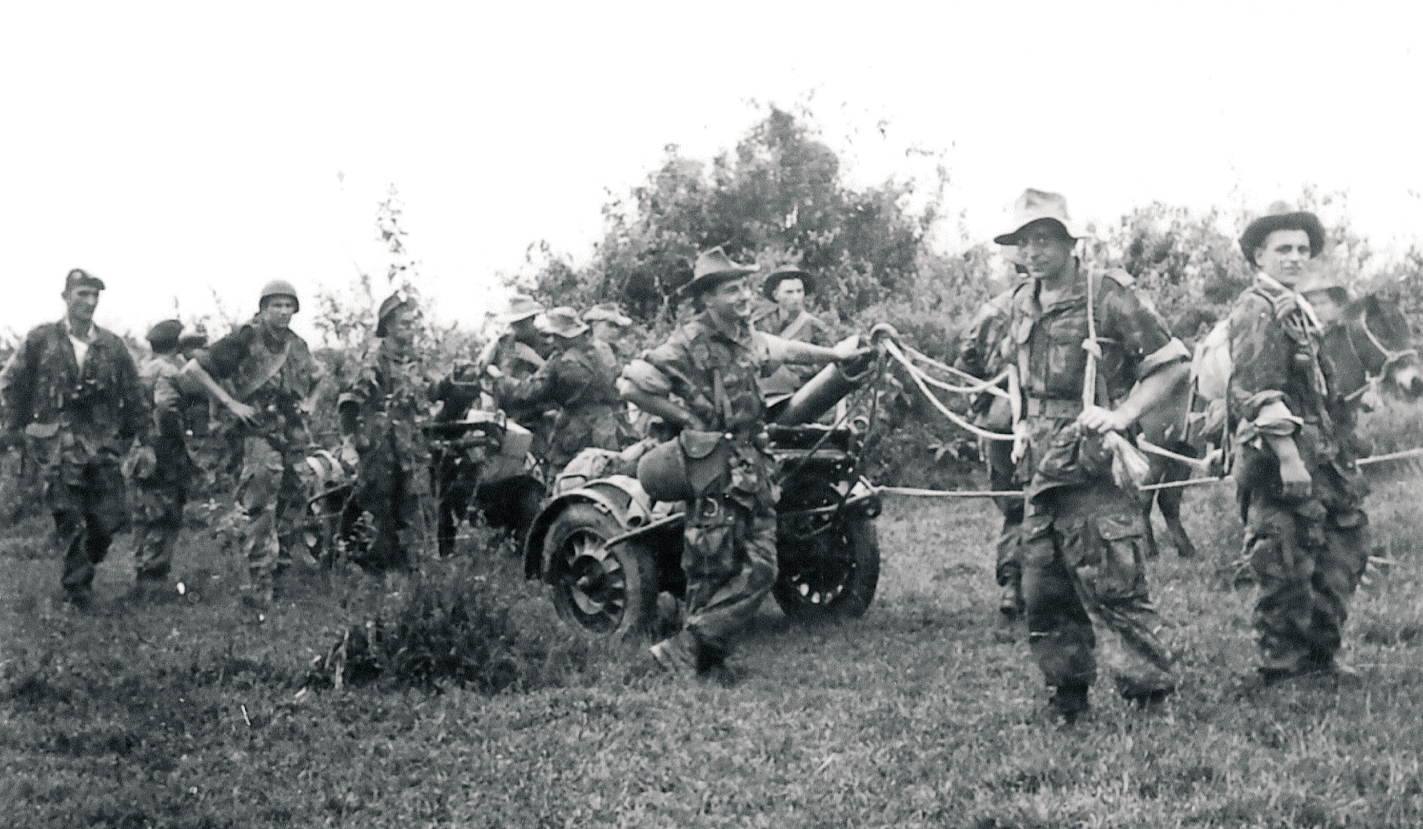 1ère compagnie étrangère parachutiste de mortiers lourds en Indochine avec 2 mortiers Brandt 120 mm type A.M. 50.